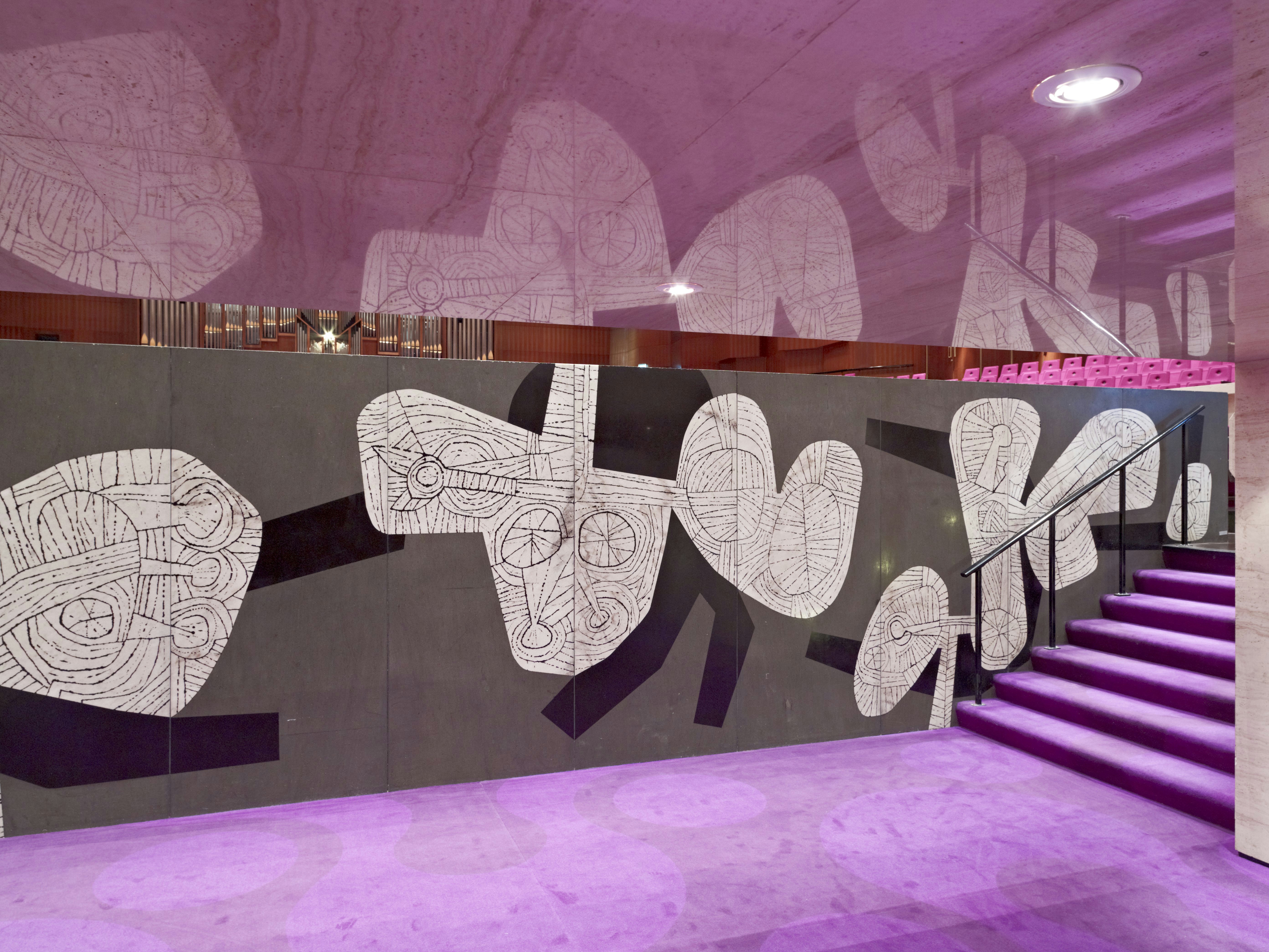 Concert- en congresgebouw De Doelen: Interieur, kunstwerk in de Grote zaal van kunstenaar Bouke IJlstra